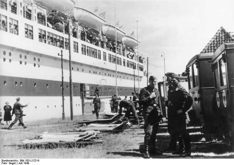 Lazarettschiff "Wilhelm Gustloff" bringt verwundete Narvik - Kämpfer nach der Heimat. Sanitätssoldaten bereiten am Kai das Ausladen der Verwundeten vor. PK - Augst, 5977-40, Juli 1940